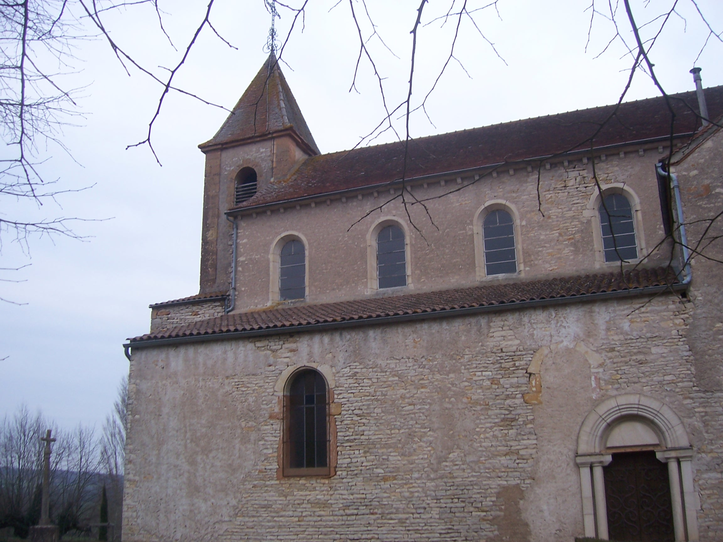 Eglise de Cortevaix